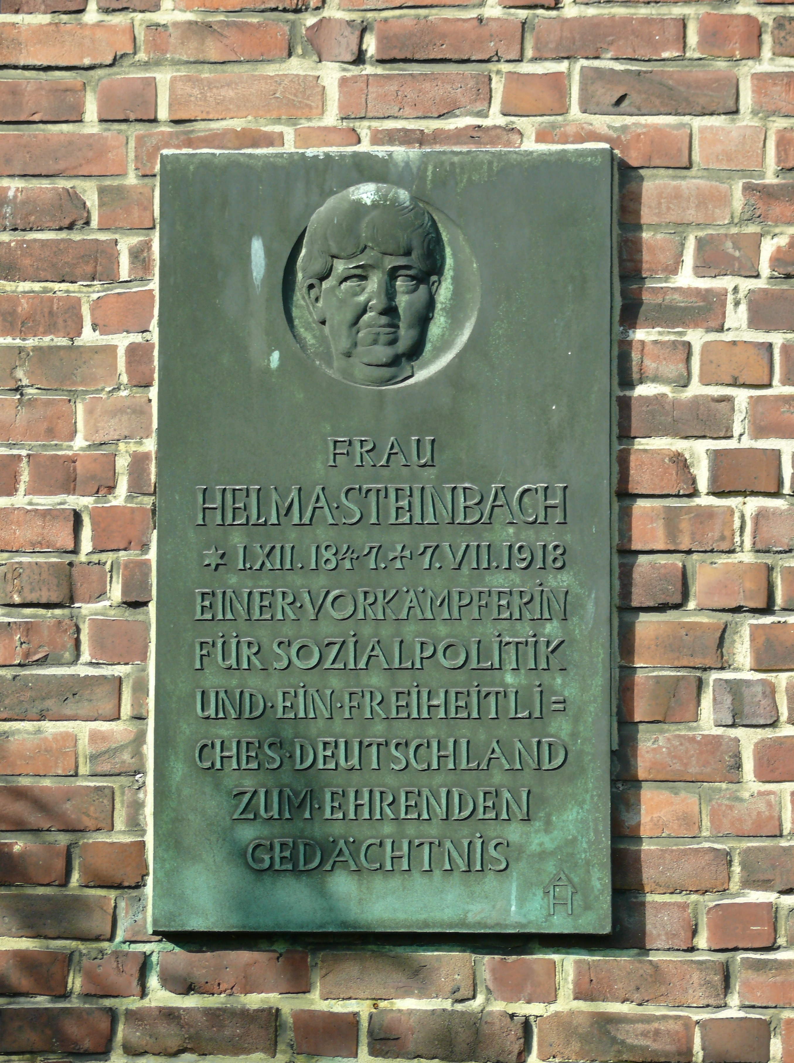 Schleswig-Holstein Wedel Milichstr. Siedlung „Helma-Steinbach“ Plakette